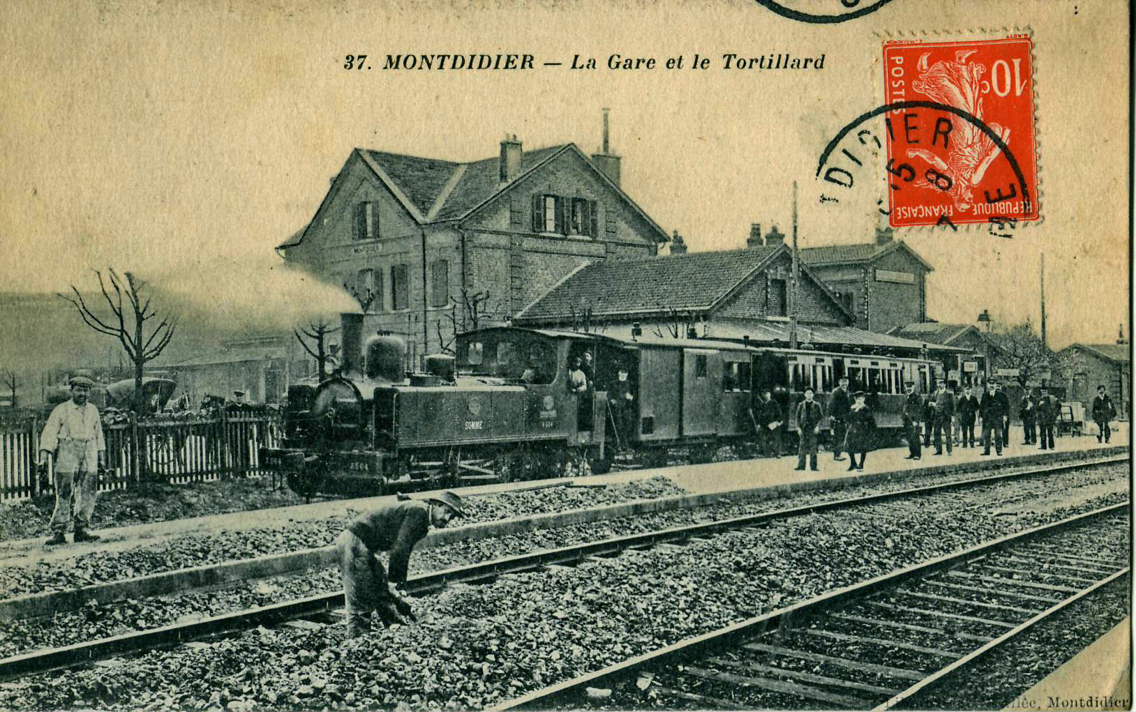 Carte postale ancienne éditée par Vallée à MontdidierLa Gare et le TortillardIl s'agit d'une rame des Chemins de fer départementaux de la Somme tractée par la locomotive Somme n°3564